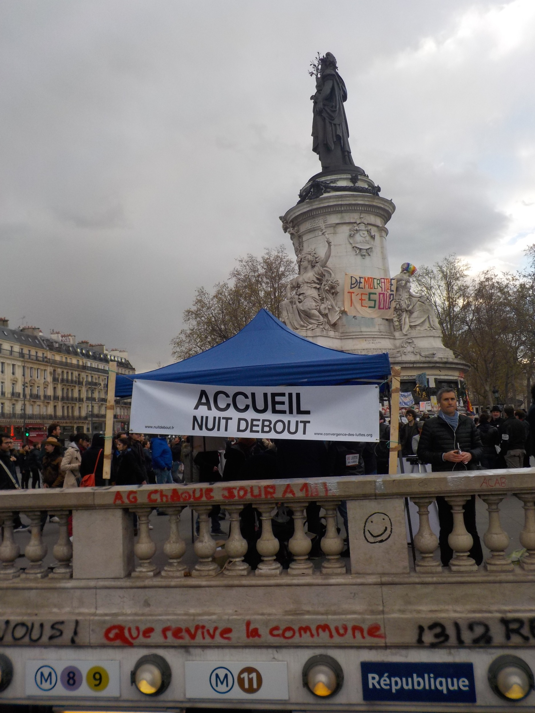 Nuit debout Assemblée générale chaque jour. Que revive la commune. Démocratie t'es ou ? République